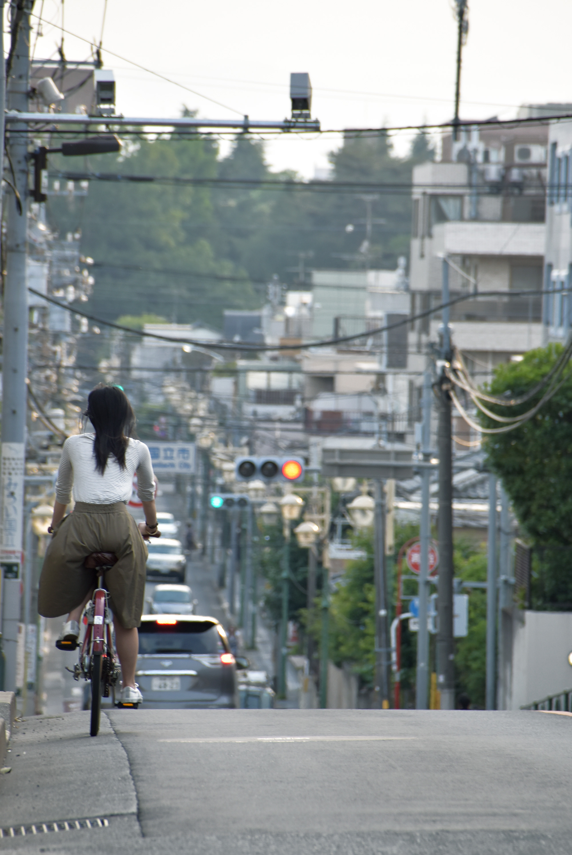 tamaranzaka kunitachi city